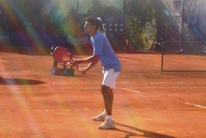 La Serena Open, Jorge Aguilar